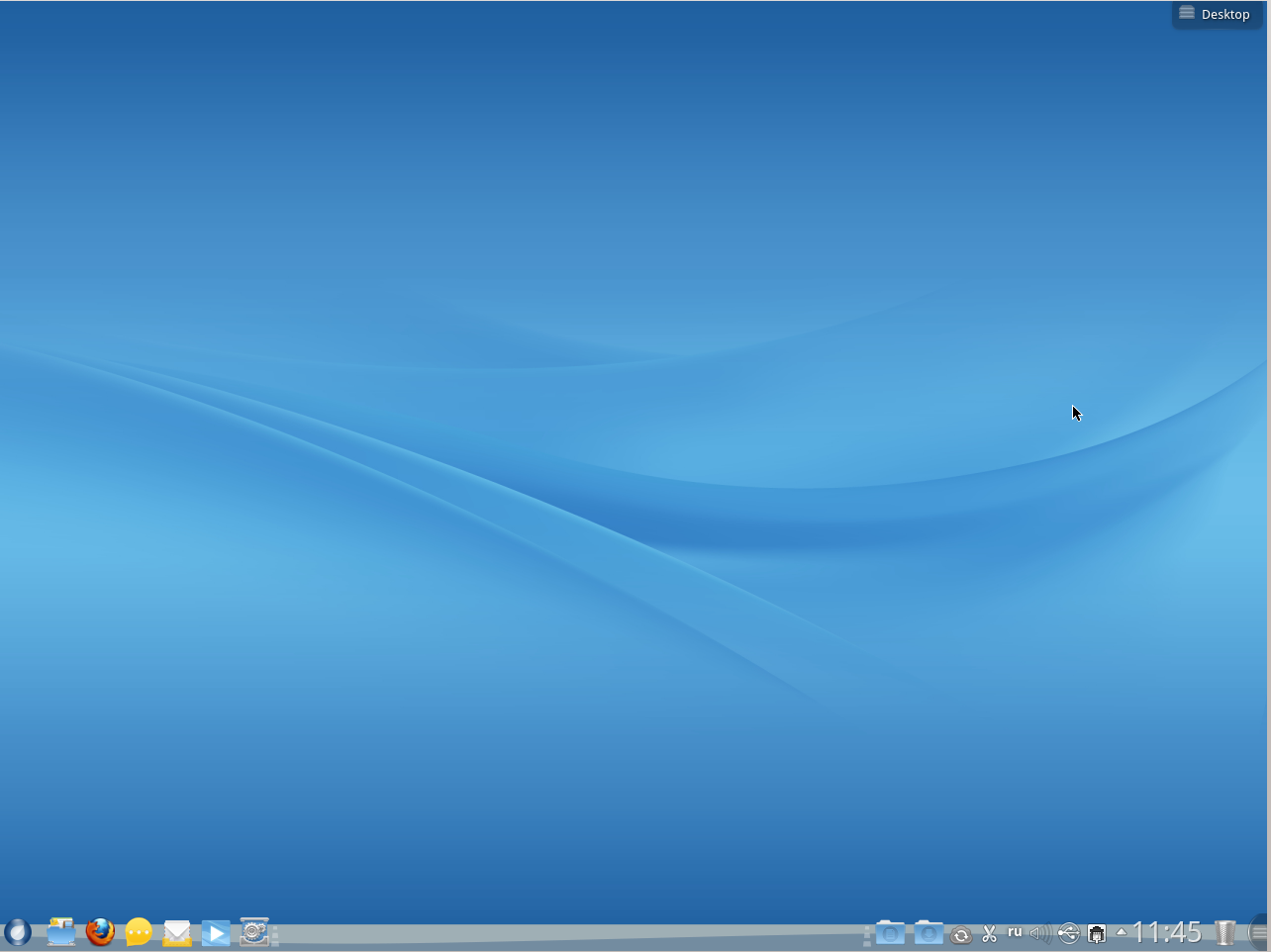 Скриншот рабочего стола ROSA 2012LTS